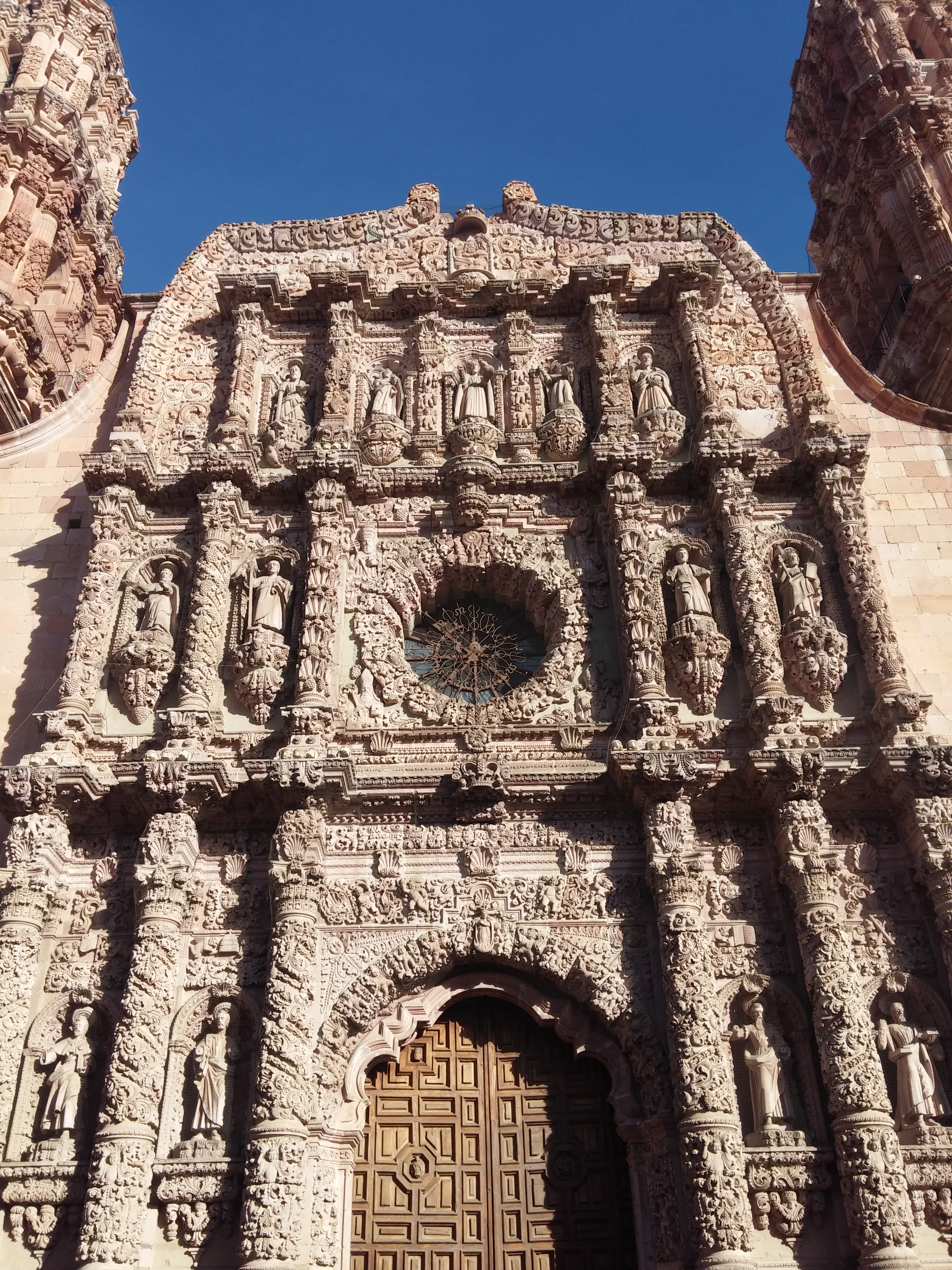 Catedral de Zacatecas